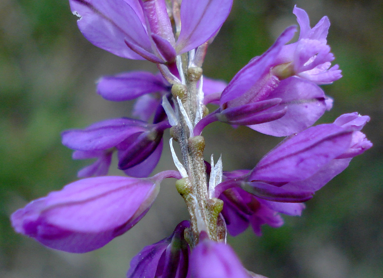 Polygala vulgaris (Unterfranken, Germany)